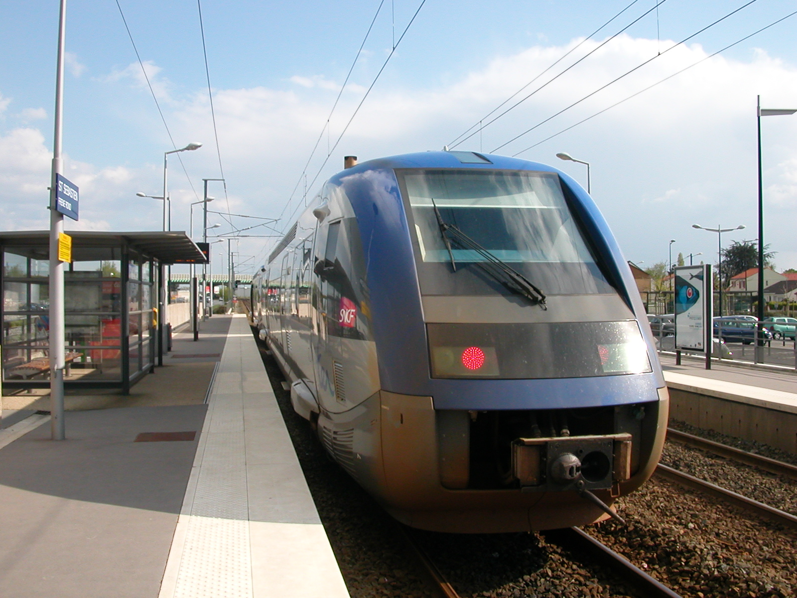 Rame TER X73500 en gare de Saint-Sébastien-Frêne-Rond.